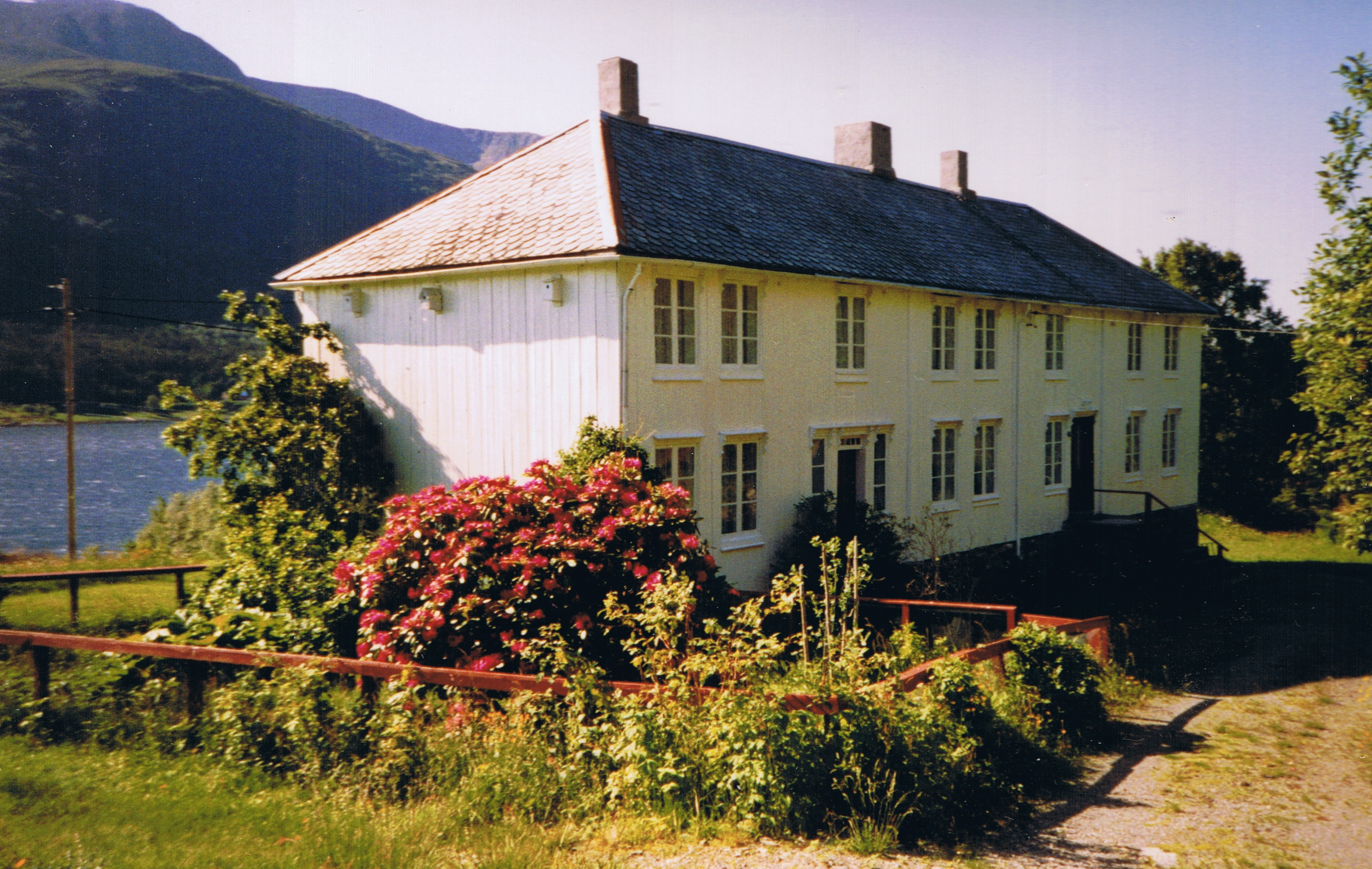 Valmtak på hus på Innerberg på Stabblandet i Aure kommune i Noreg.